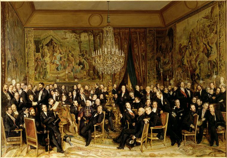 Une soirée au Louvre chez le comte de Nieuwerkerke